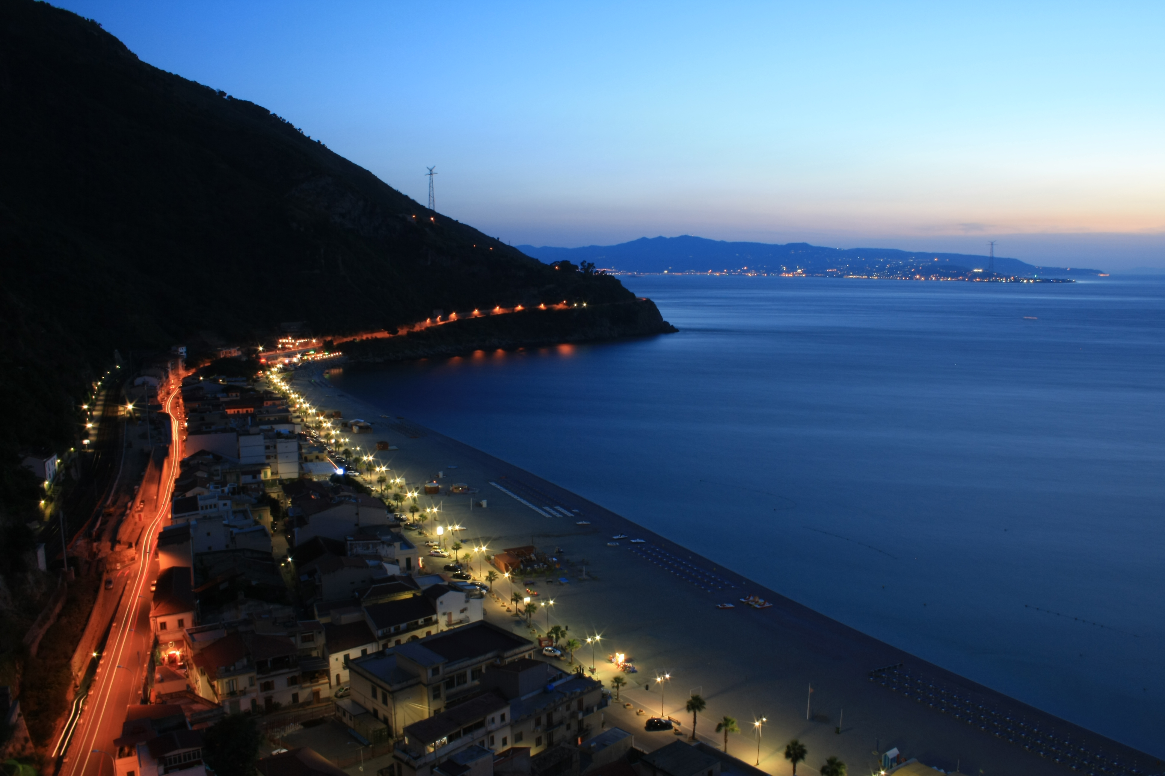 Marina grande di Scilla, fotografata da piazza San Rocco.